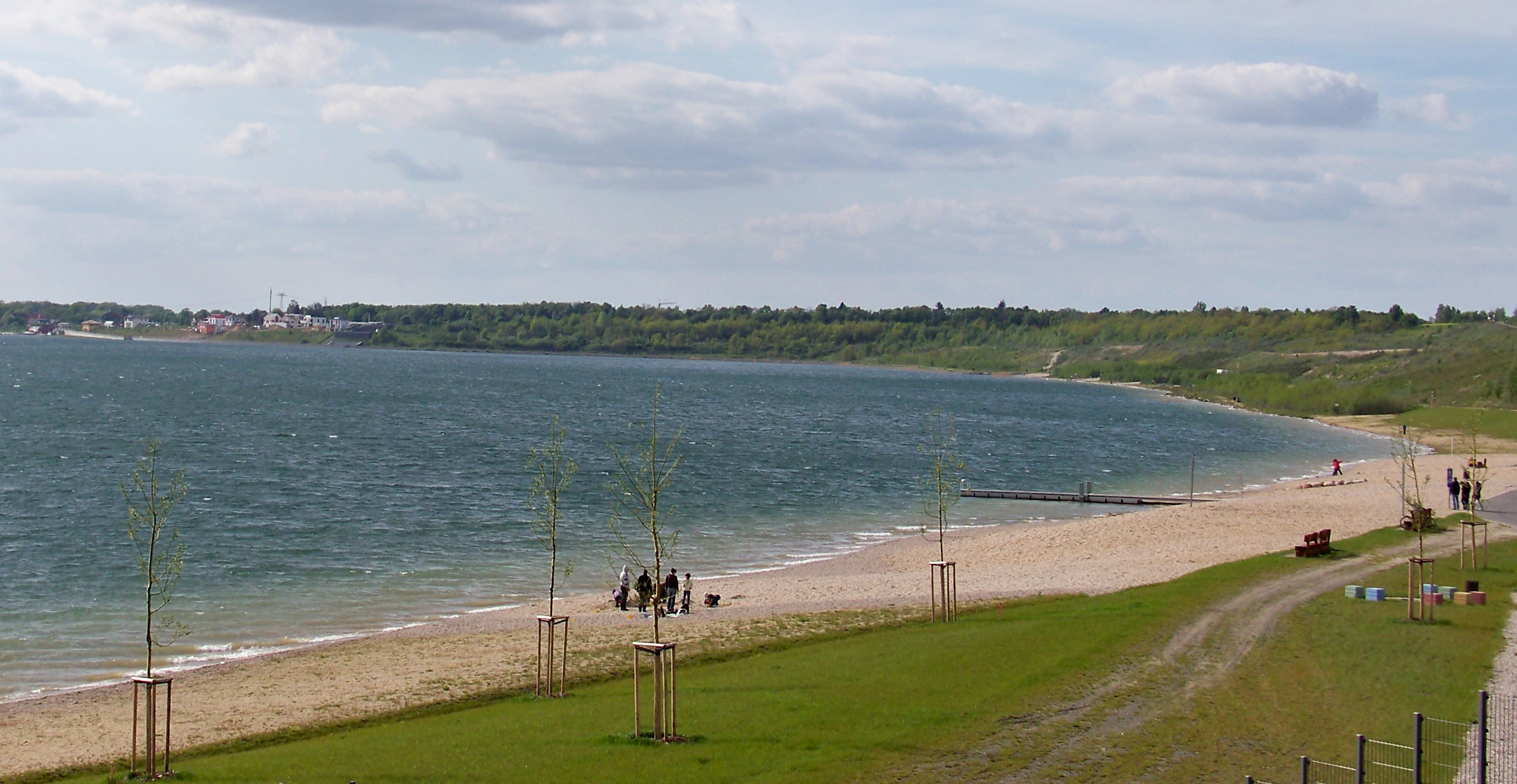 Strand am Ostufer des Markkleeberger Sees südlich von Leipzig, Deutschland